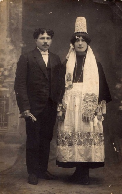 Un couple de mariés de Penmarc'h en 1919